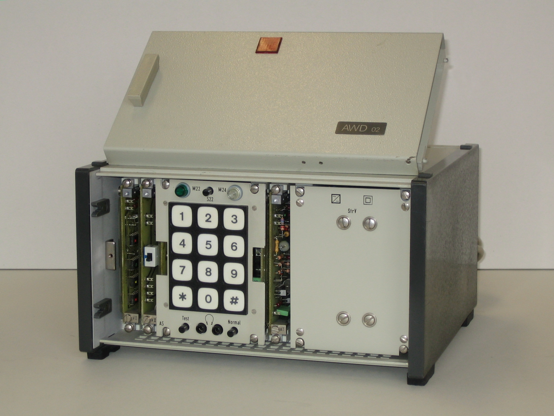 Automatische Wähleinrichtung für Datenverbindungen, Hersteller Siemens, Baujahr 1978